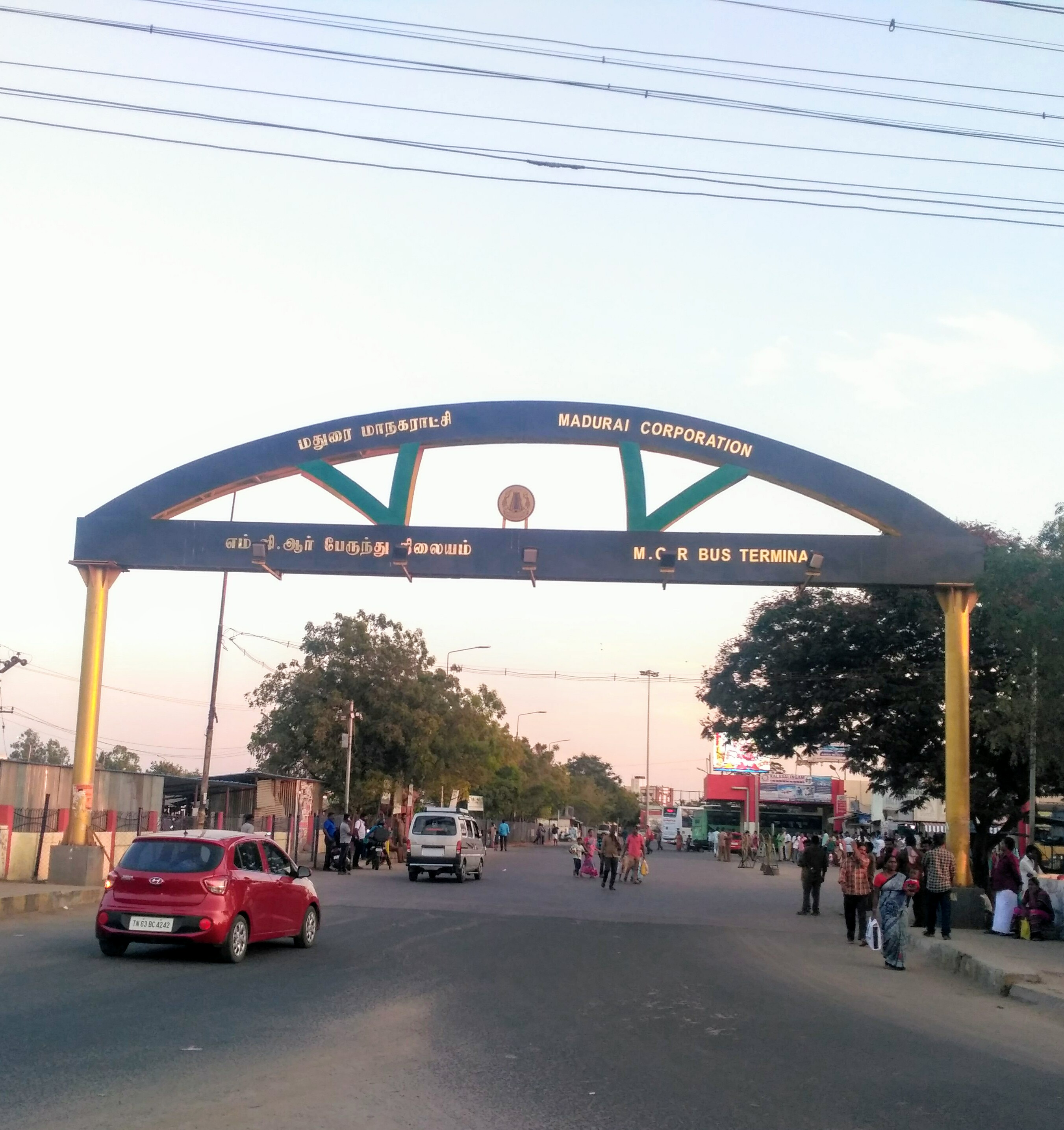 மதுரை மாட்டுத்தாவணி பேருந்து நிலையத்தின் நுழைவாயில்